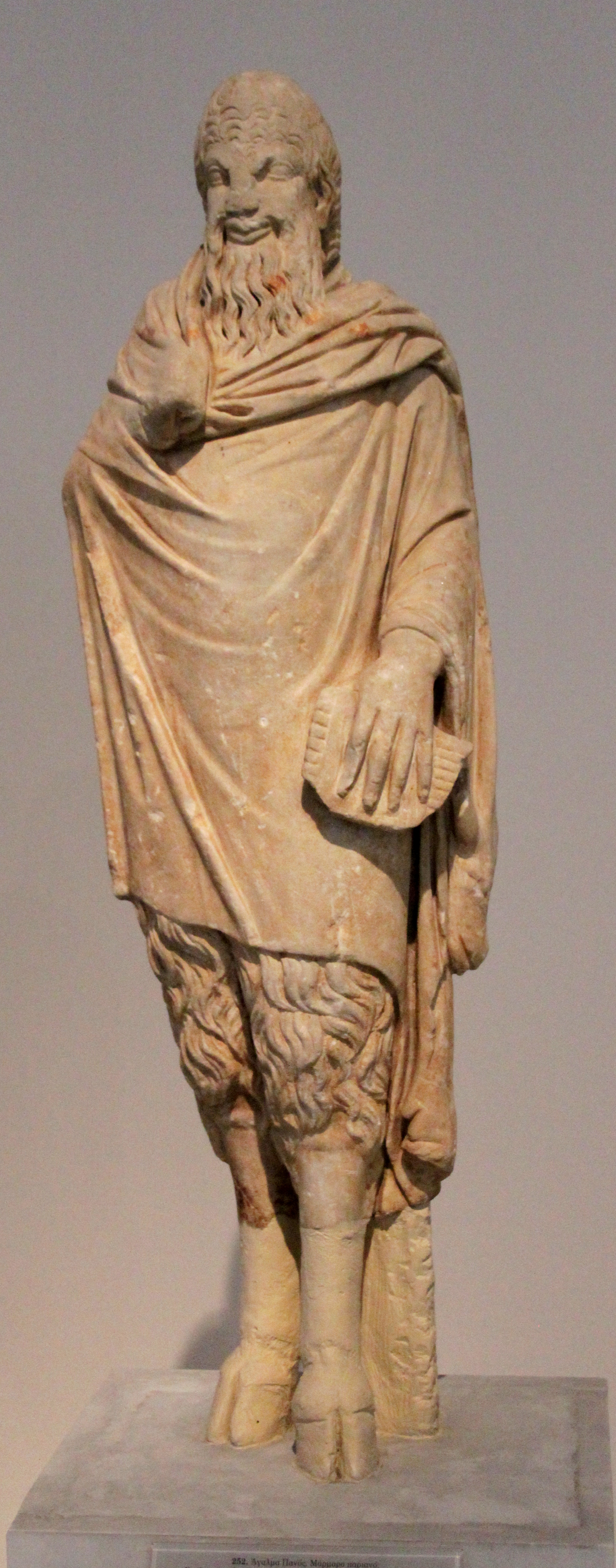 Statua in marmo pario del dio Pan risalente al I secolo d.C., copia di un originale del IV secolo a.C. Rinvenuta a Sparta, è oggi conservata presso il Museo archeologico nazionale di Atene.